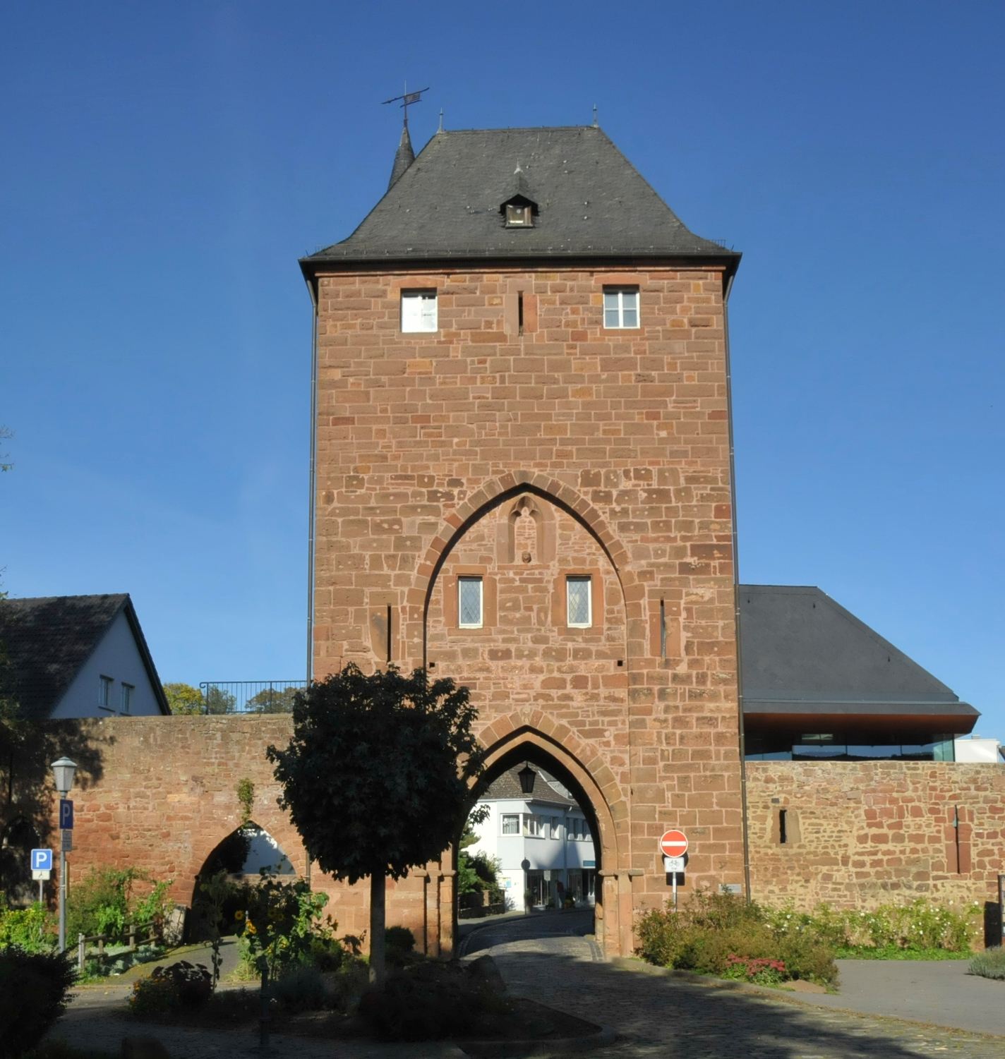 Nideggen, Zülpicher Tor, Feldseite